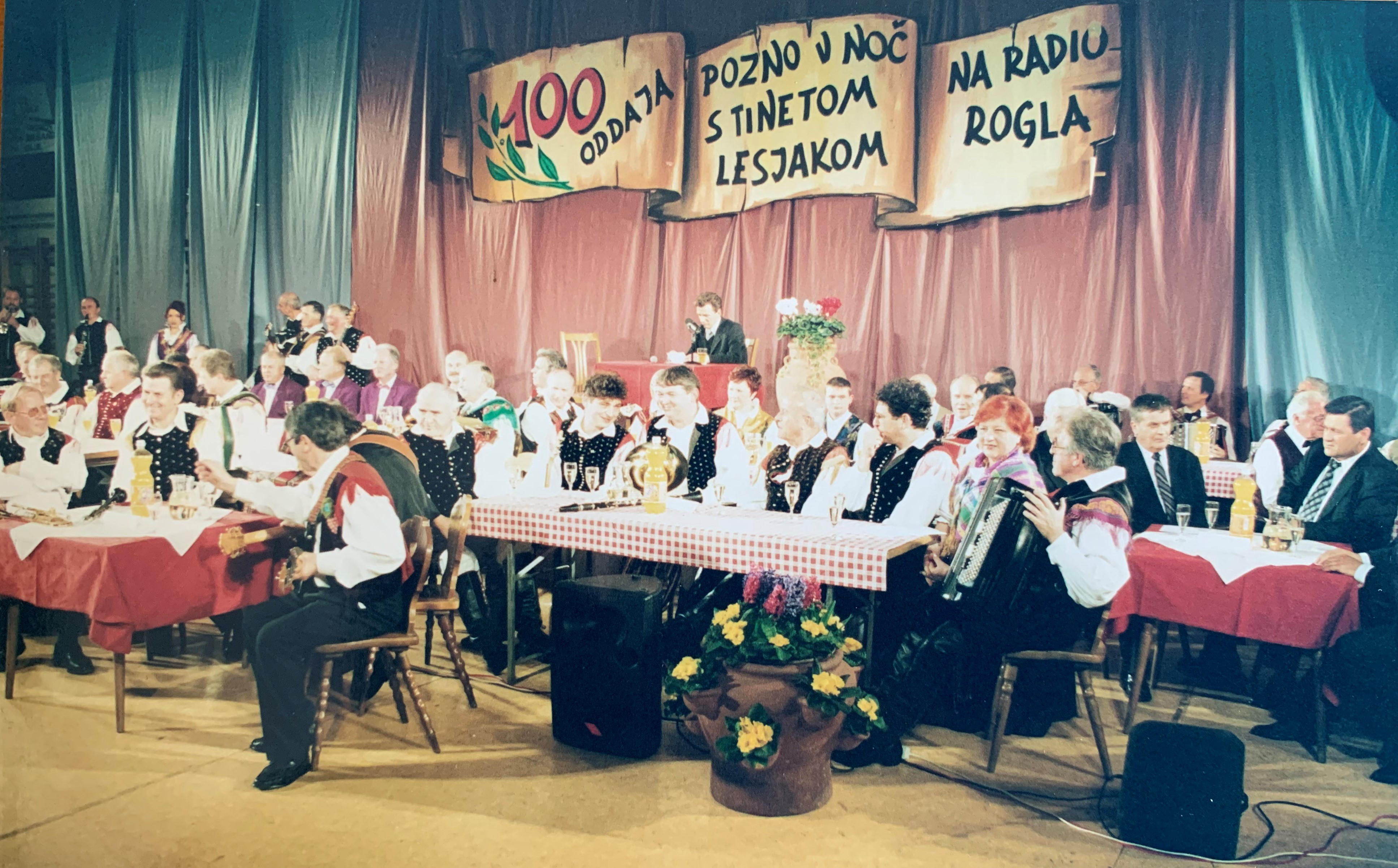 Pogled na prizorišče radijske oddaje v živo v Slovenskih Konjicah.